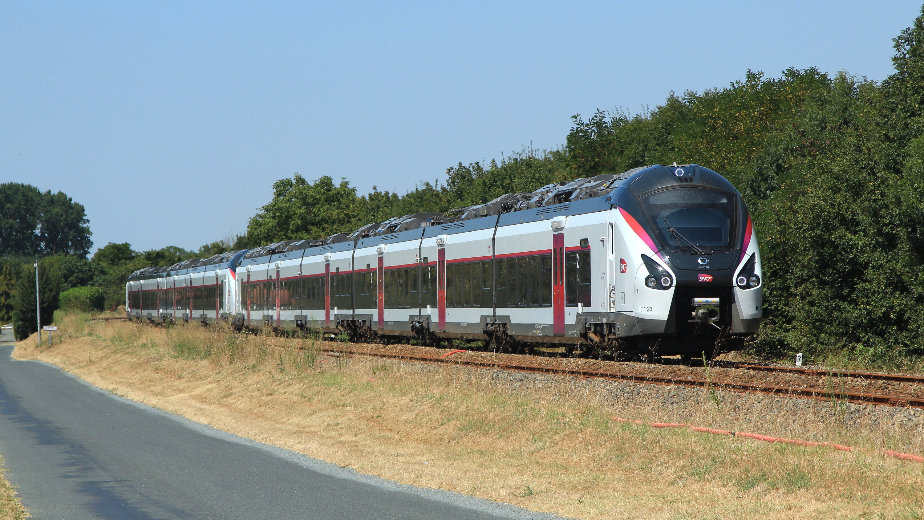 Les Régiolis IC 1 23 et 24 (B 85045/46 et B 85047/48) assurant le train Intercité n° 3833 (Nantes - Bordeaux de mi-journée) passent près du PN n°112, entre Luçon et Velluire.